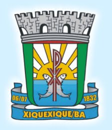 Brasão de Armas do município baiano de Xique-Xique, Brasil.